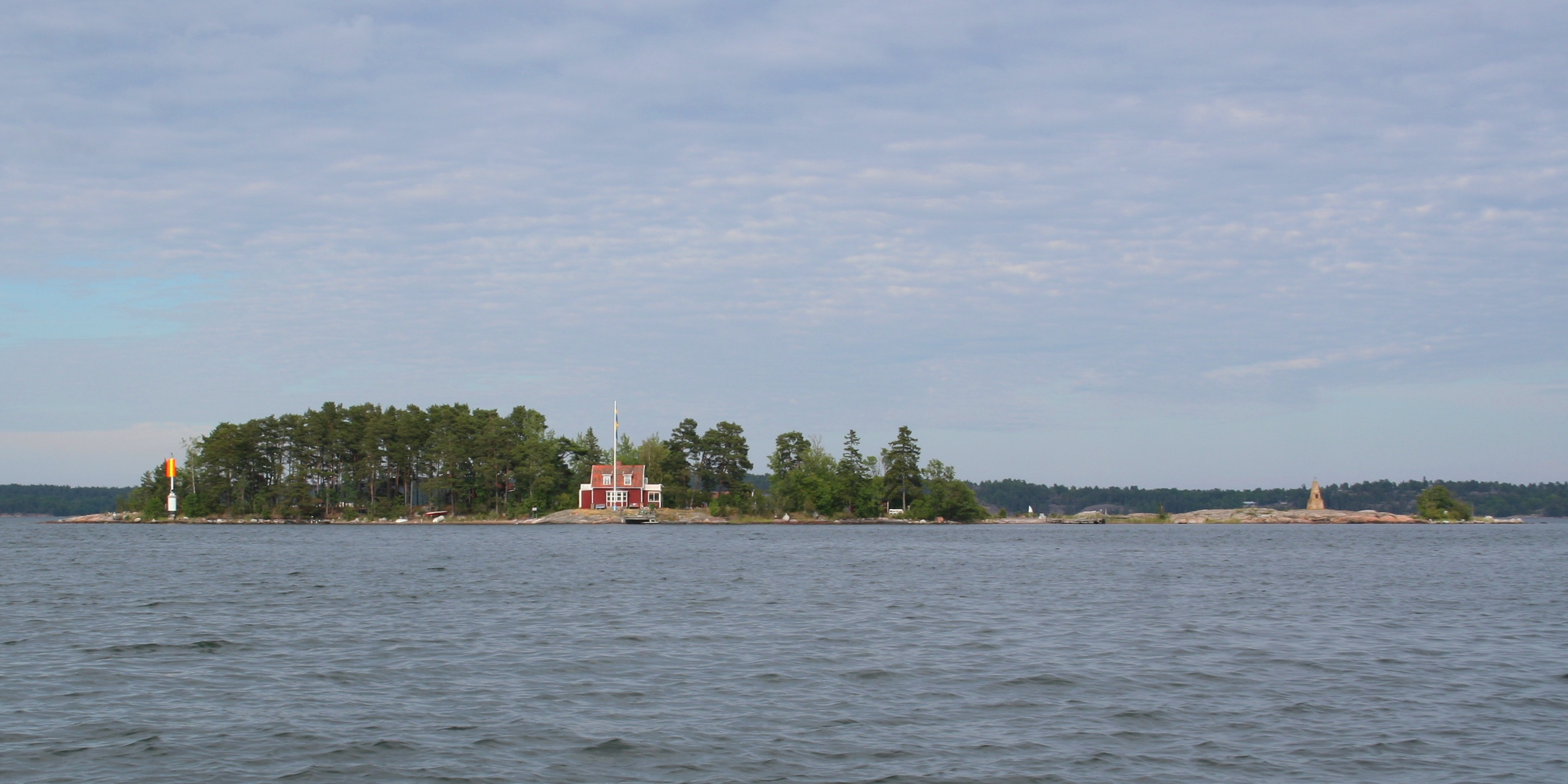 Ön Mansören i Stockholms skärgård. Med Glas-Kalles monument till höger. Källa: eget foto, fotograf: EnDumEn 3 juli 2008.